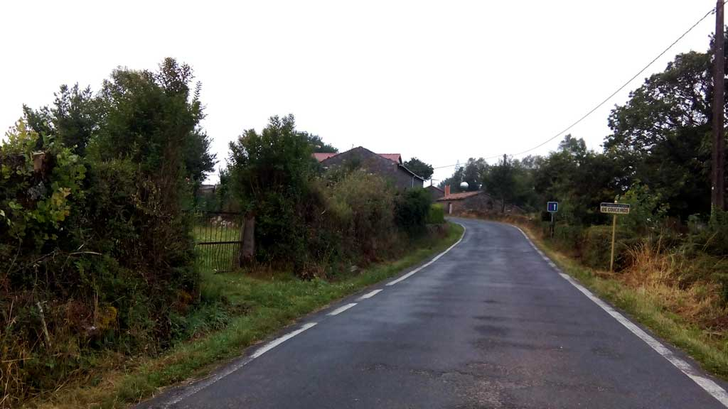 Vista dos Couceiros, Curtis.